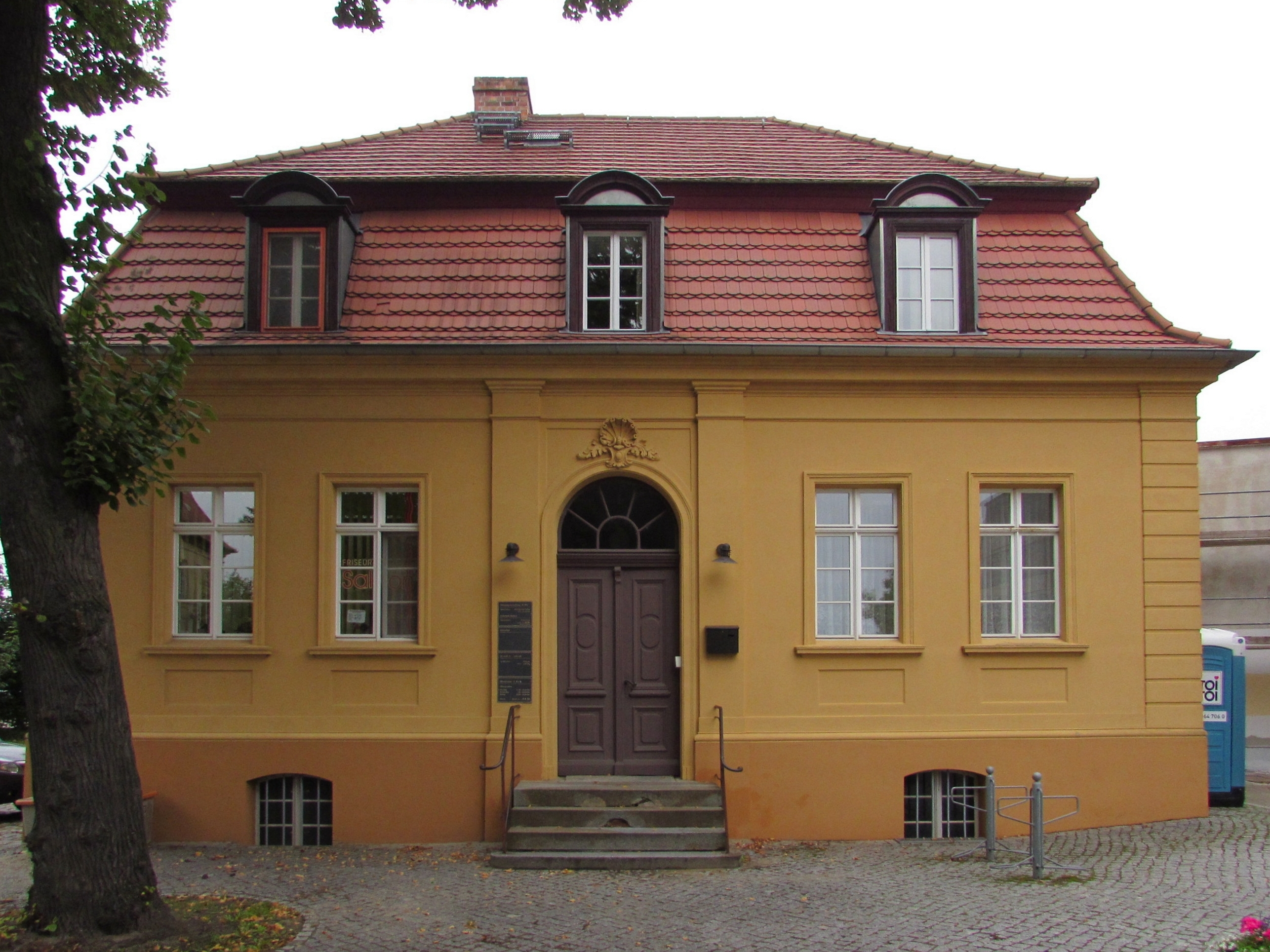 Gutsbeamtenhaus Roskow